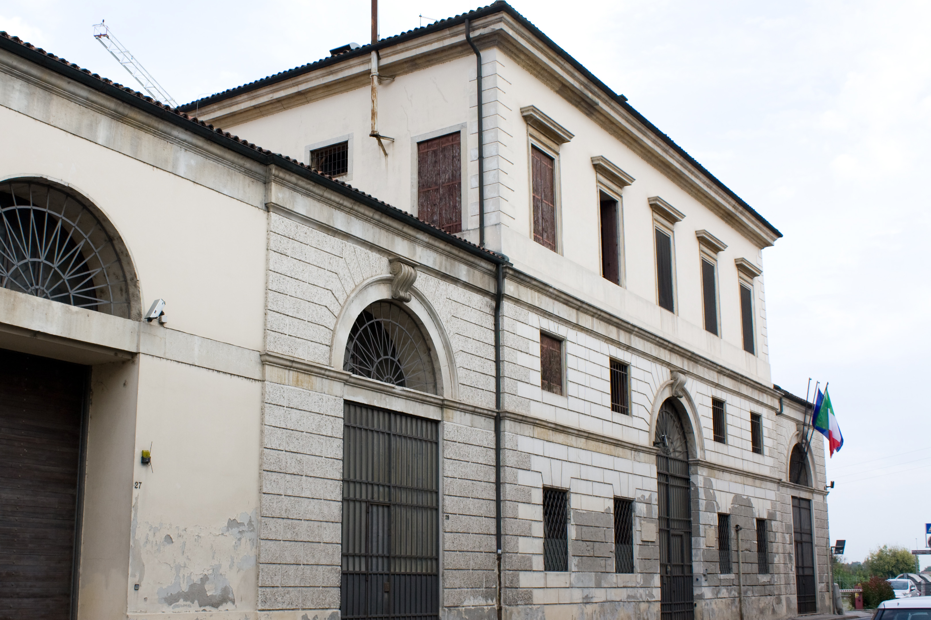 Vicenza - Borgo Berga - Magazzini del sale 1841